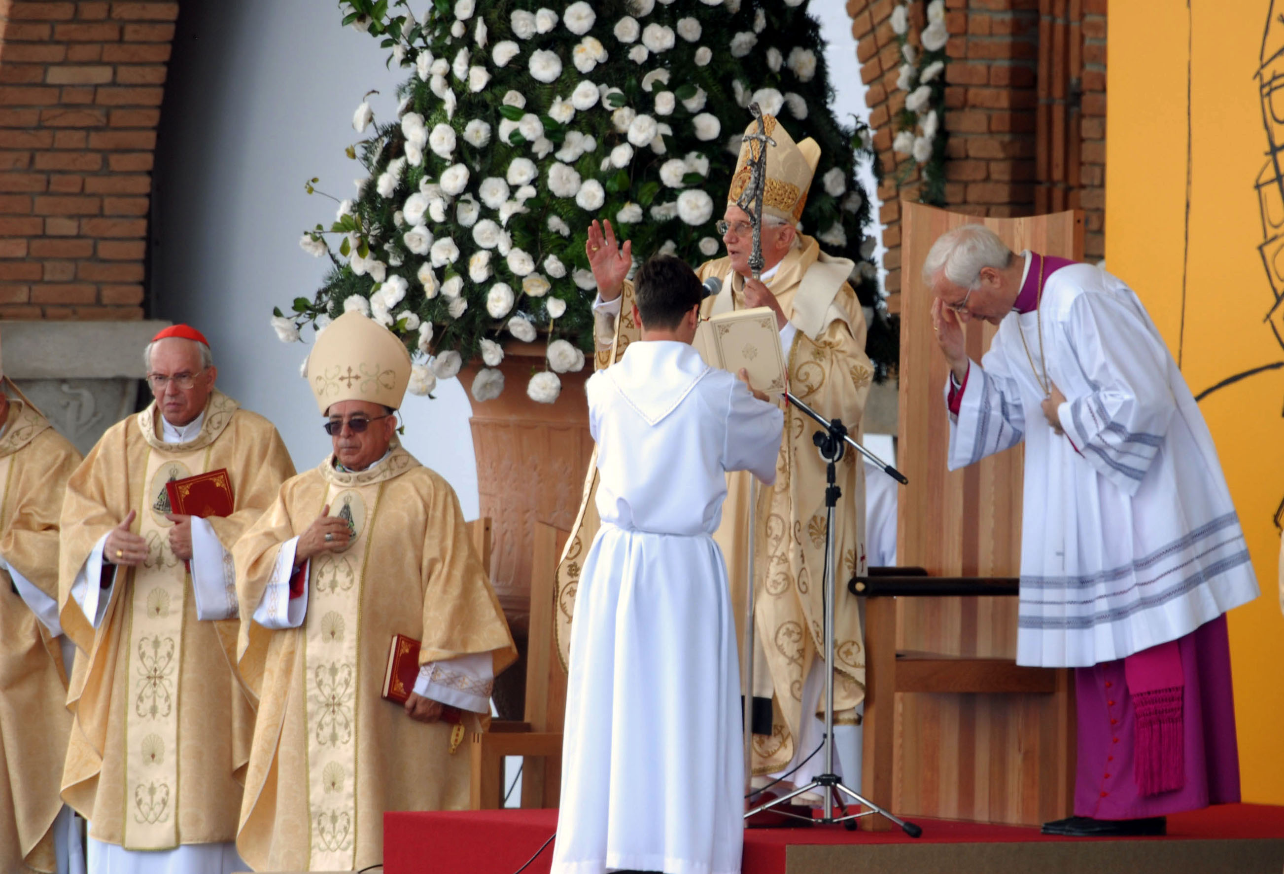 Papa Bento XVI durante missa na Basílica de Nossa Senhora Aparecida, no interior do estado de São Paulo, Brasil.